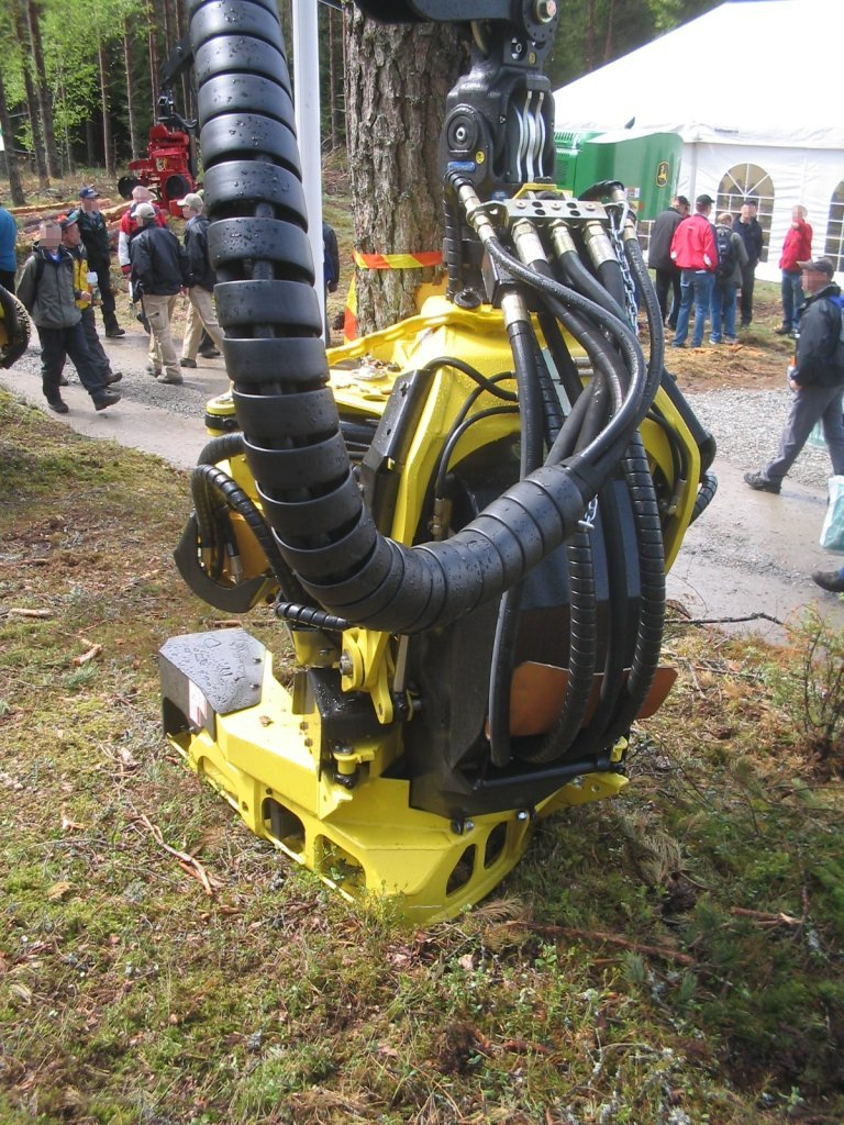 Harvesterkopf Rückseite, Vorführung auf der Elmia Wood 2005